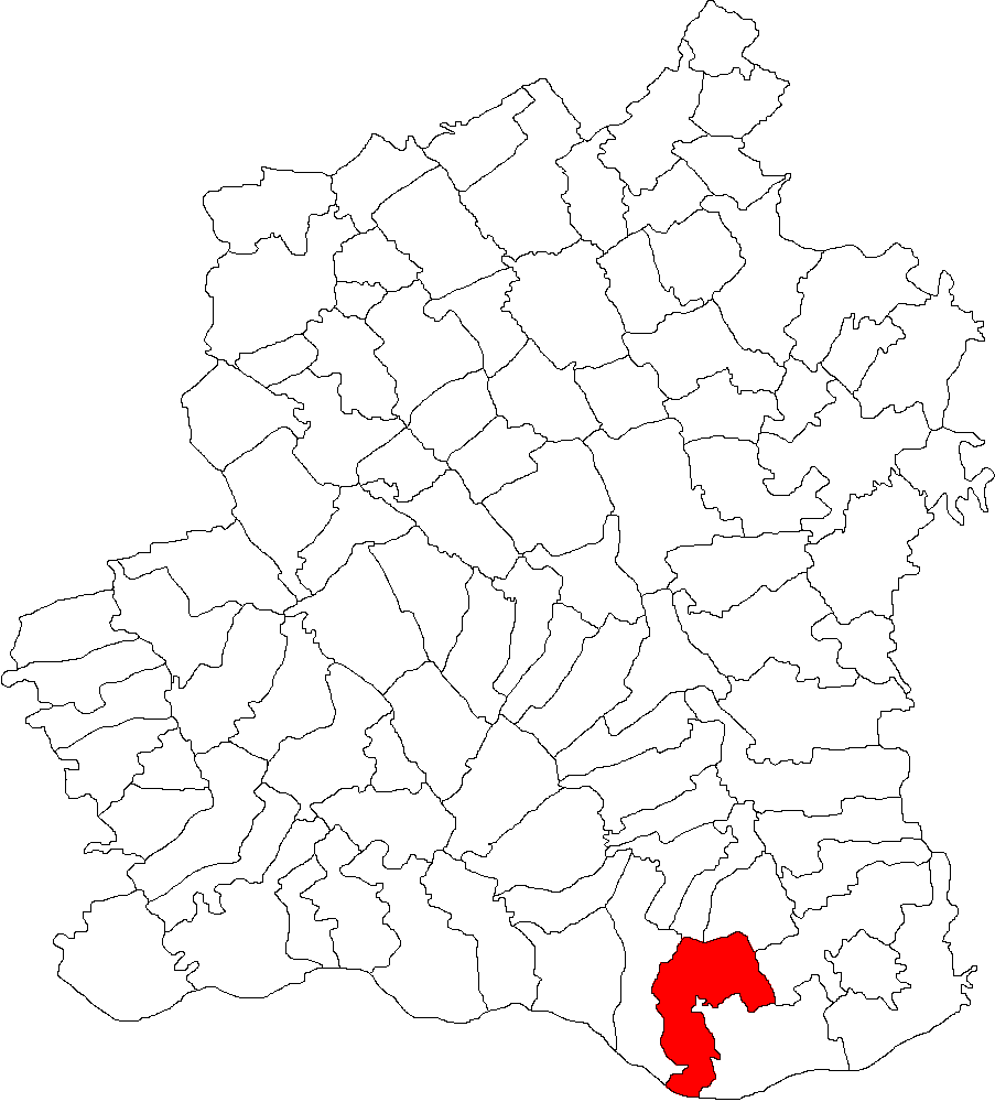 Categorie:Hărţi ale judeţului Teleorman